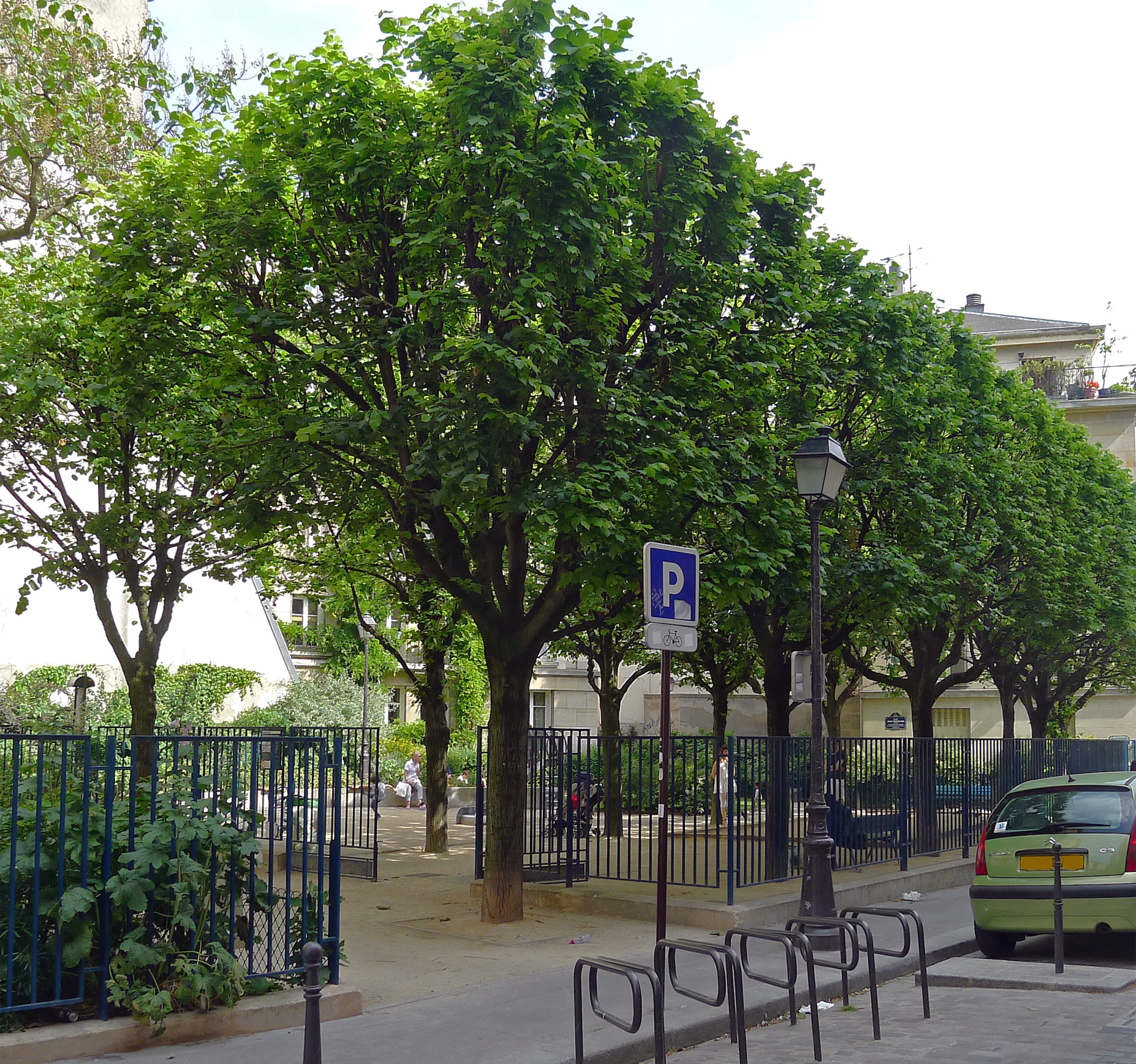 Jardin Roger Priou-Valjean - Paris IV